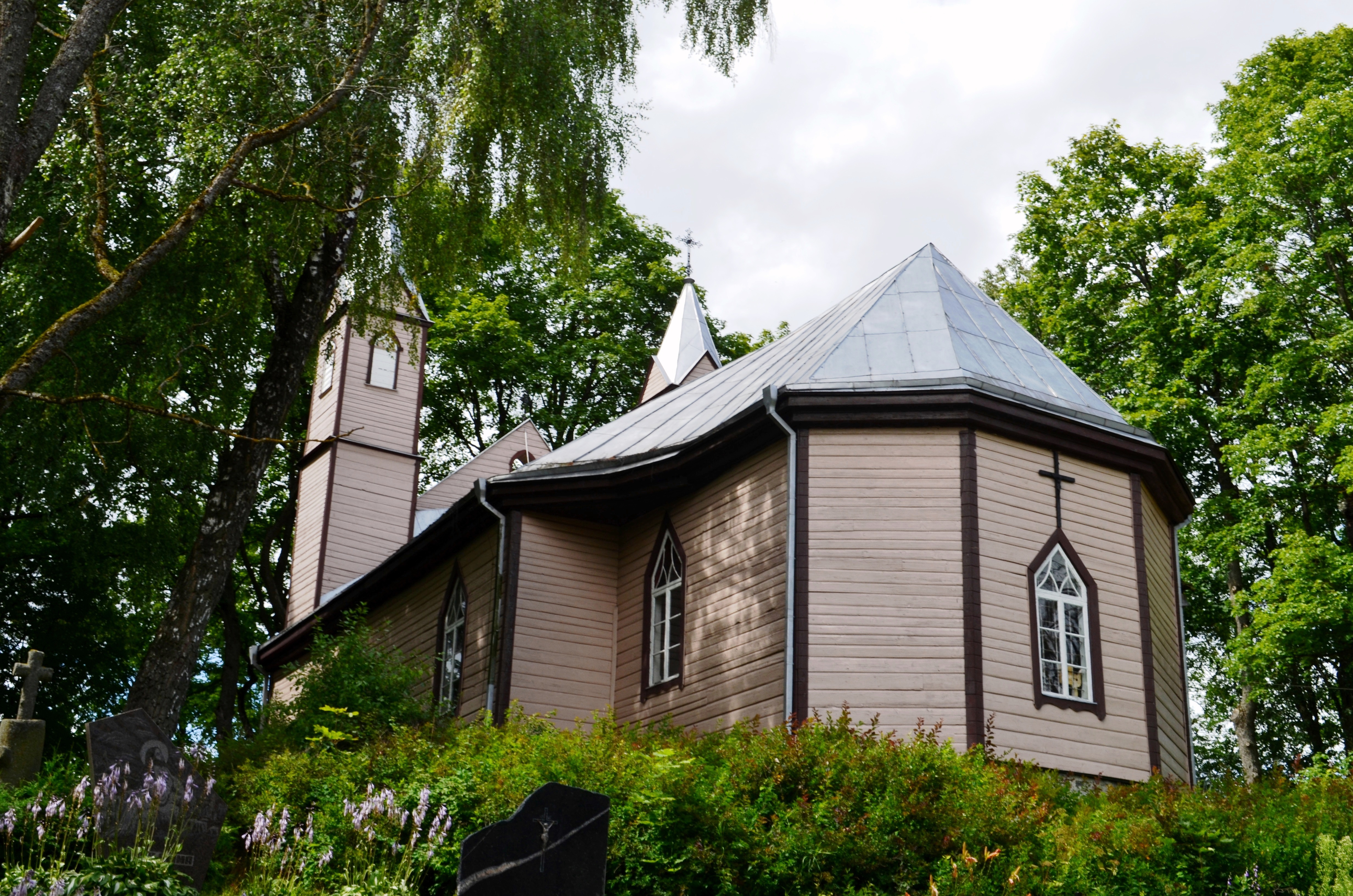 Vadaktėlių bažnyčia, Panevėžio raj.